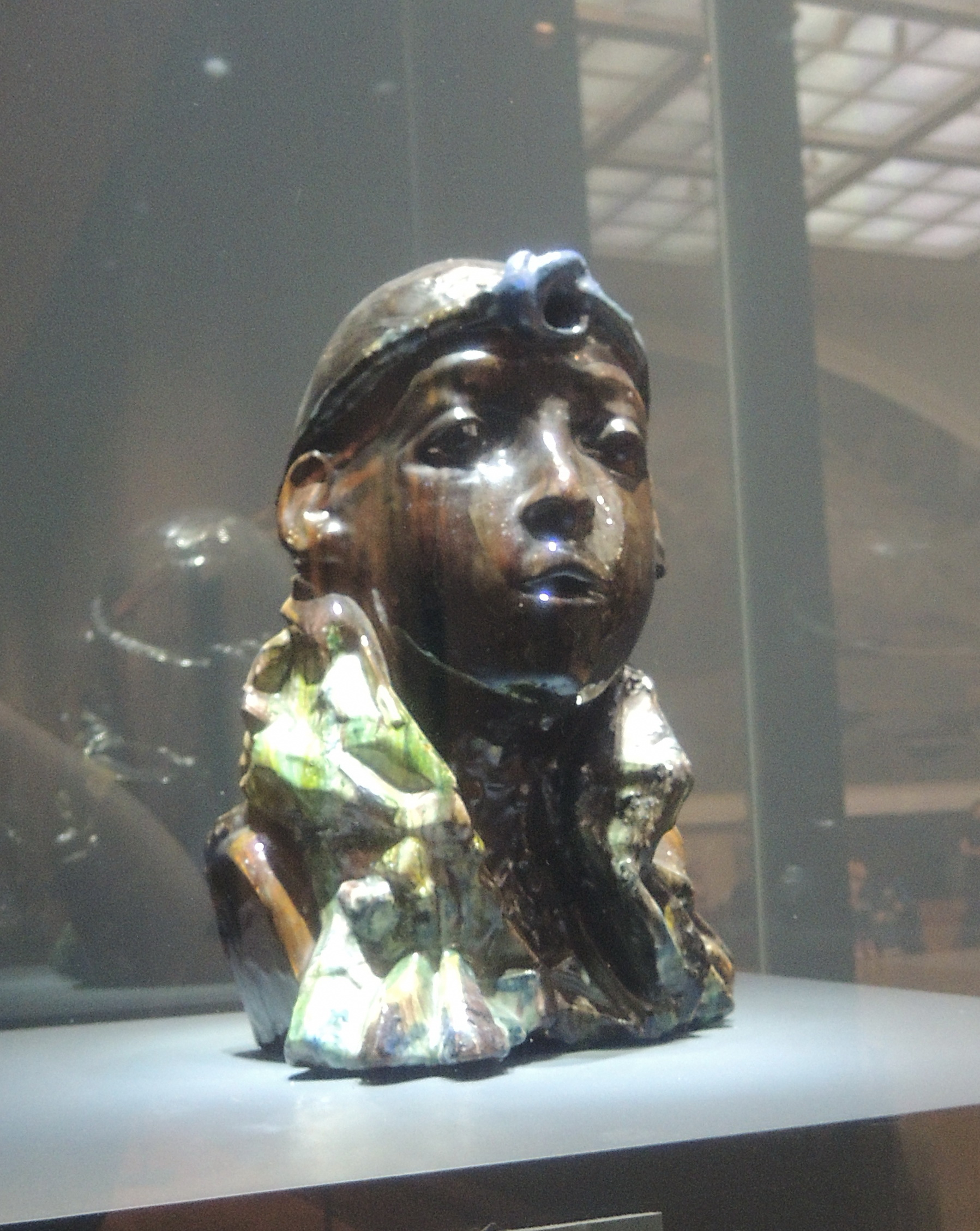 Майолика работы М.Врубеля. ГТГ